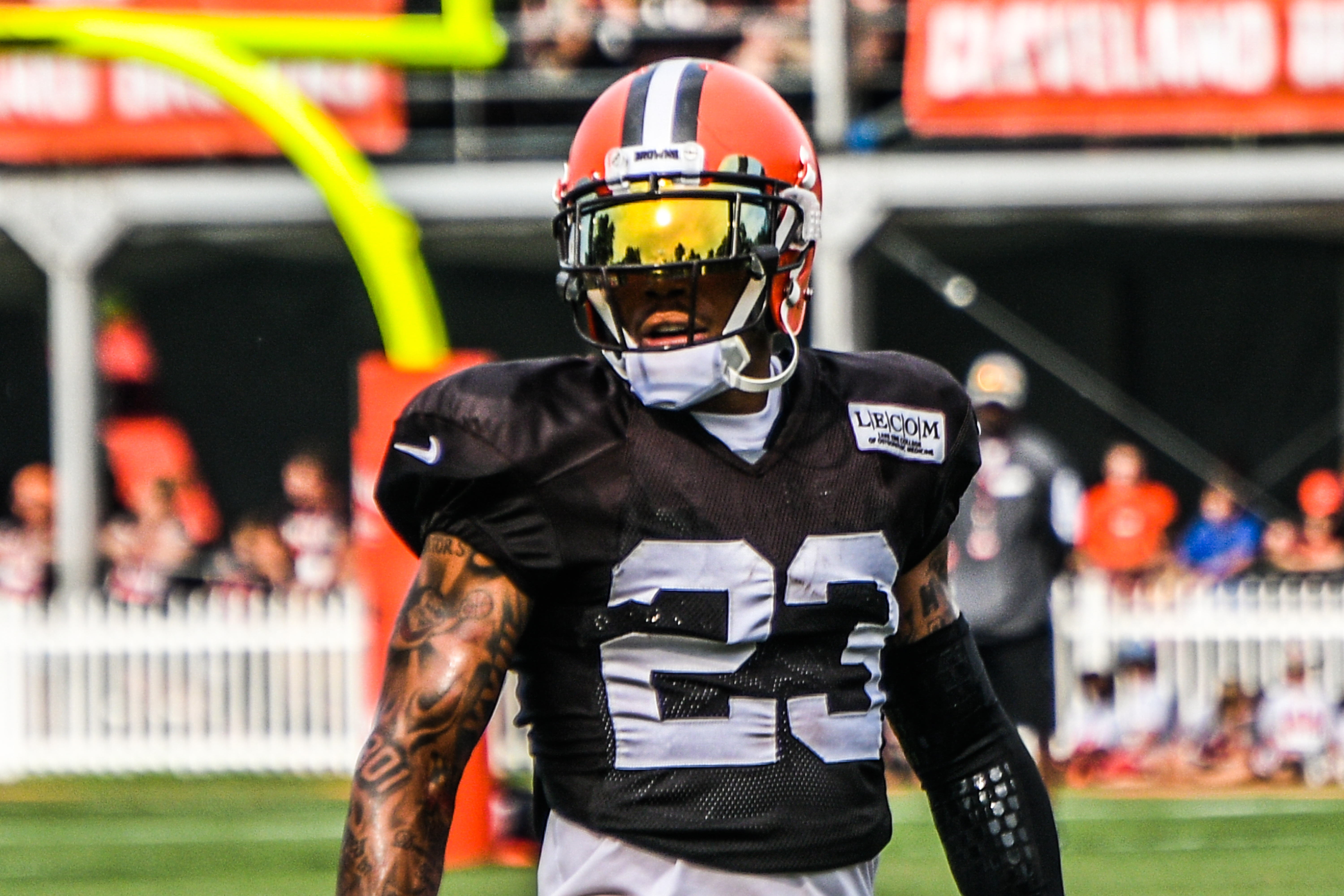 Joe Haden